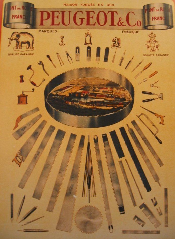 Production métalurgique de Peugeot Frère au XVIII et XIXe siecles - Musée Peugeot Sochaux